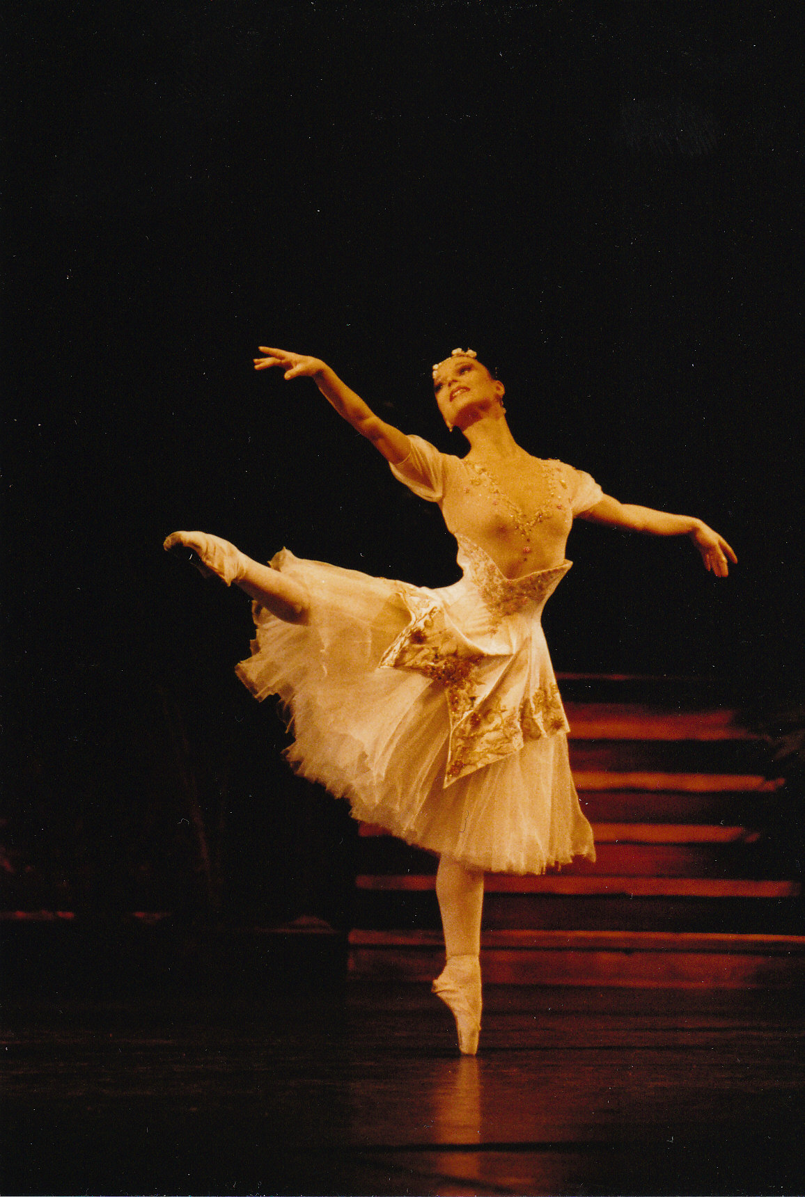 Natalie Böck im Aschenputtel